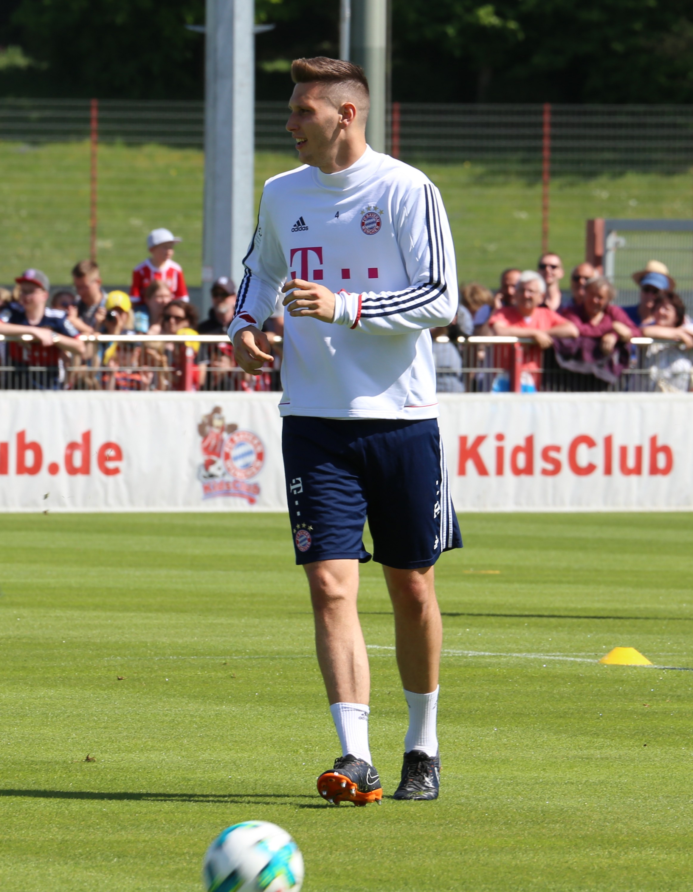 Niklas Süle, am 8. Mai 2018 beim Training auf dem Gelände des FC Bayern München